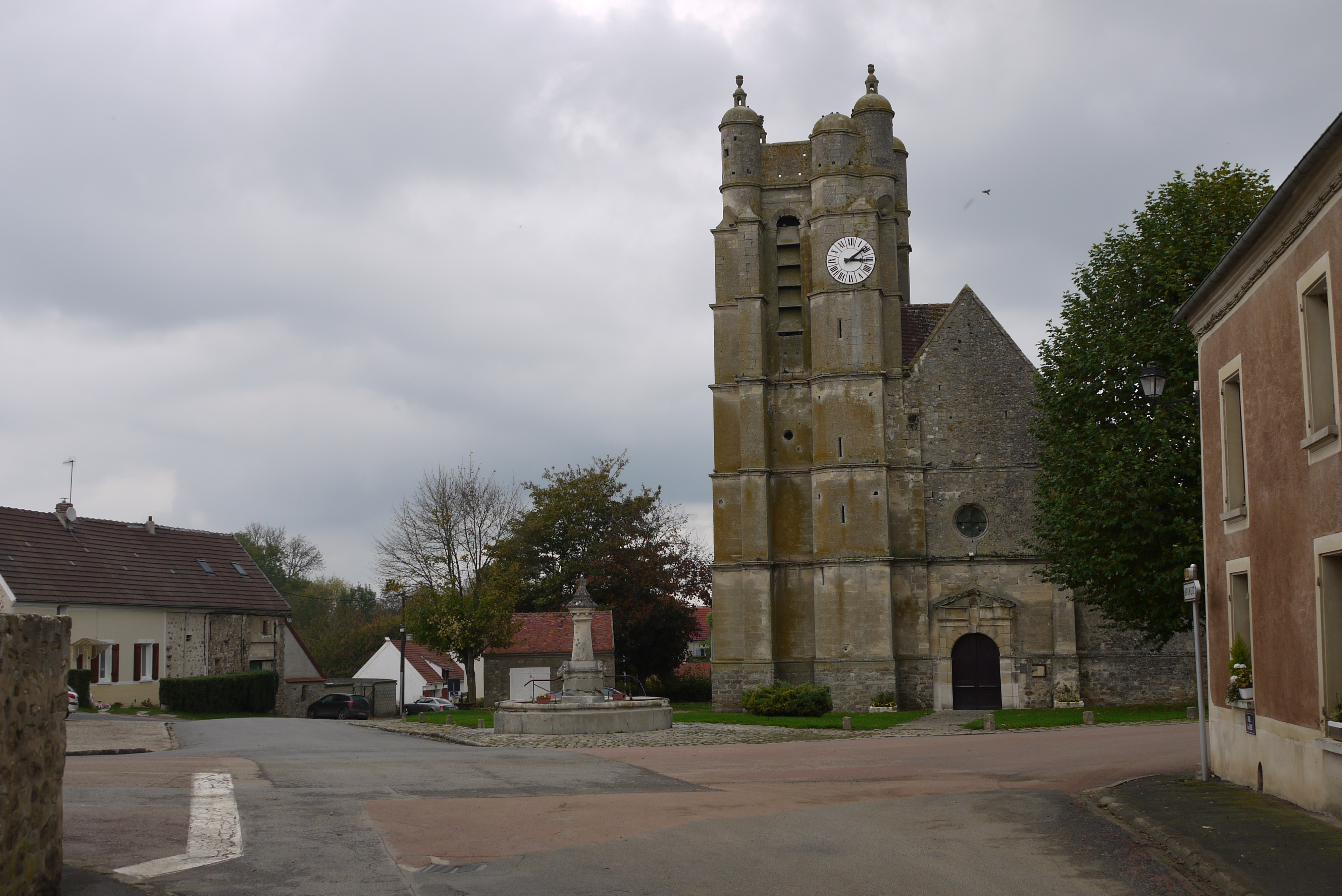 Église Saint-Denis de Chézy-en-Orxois